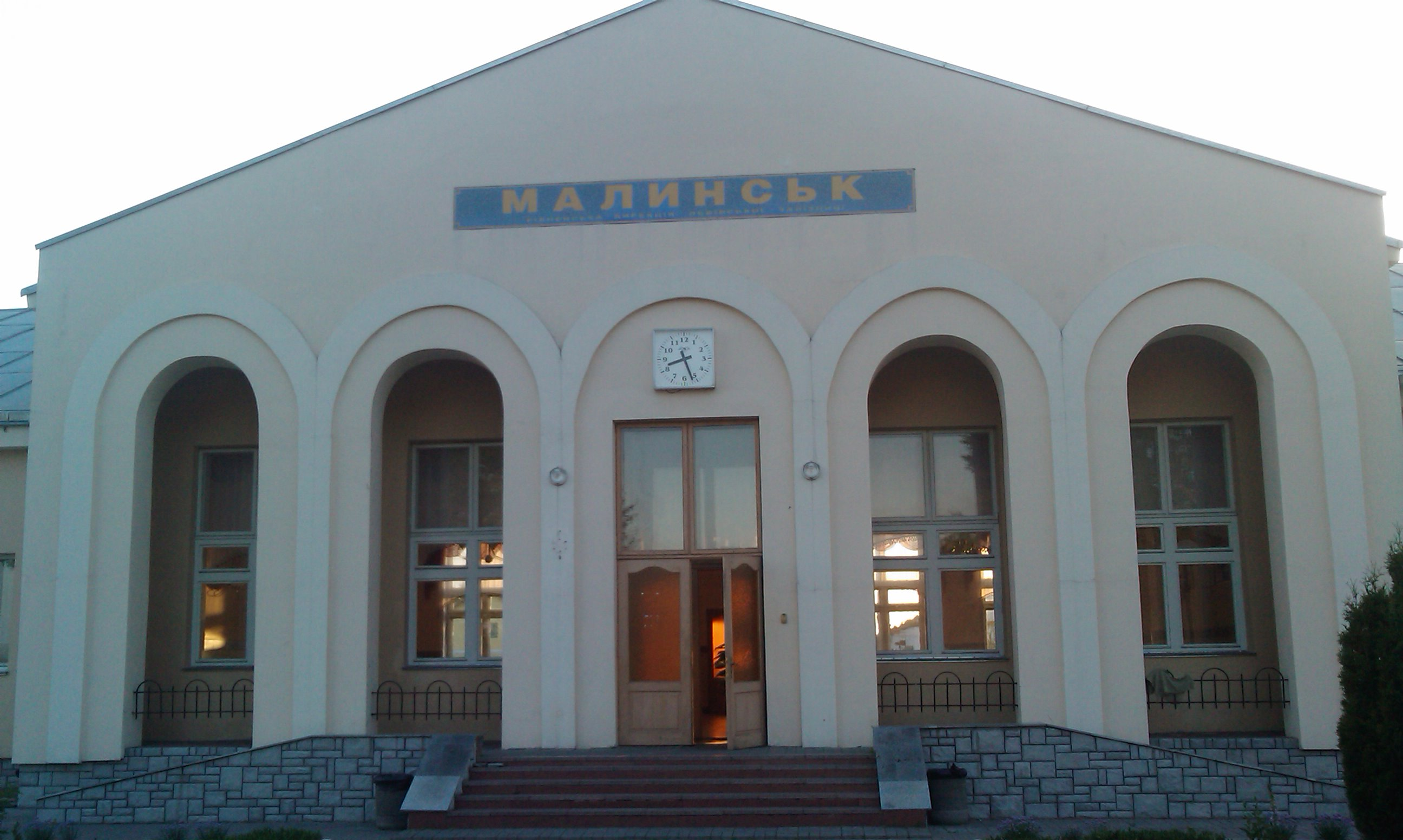 Malynsk Rivnenska oblast 02.jpg: Малинськ, Рівненська область, Україна — залізничний вокзал